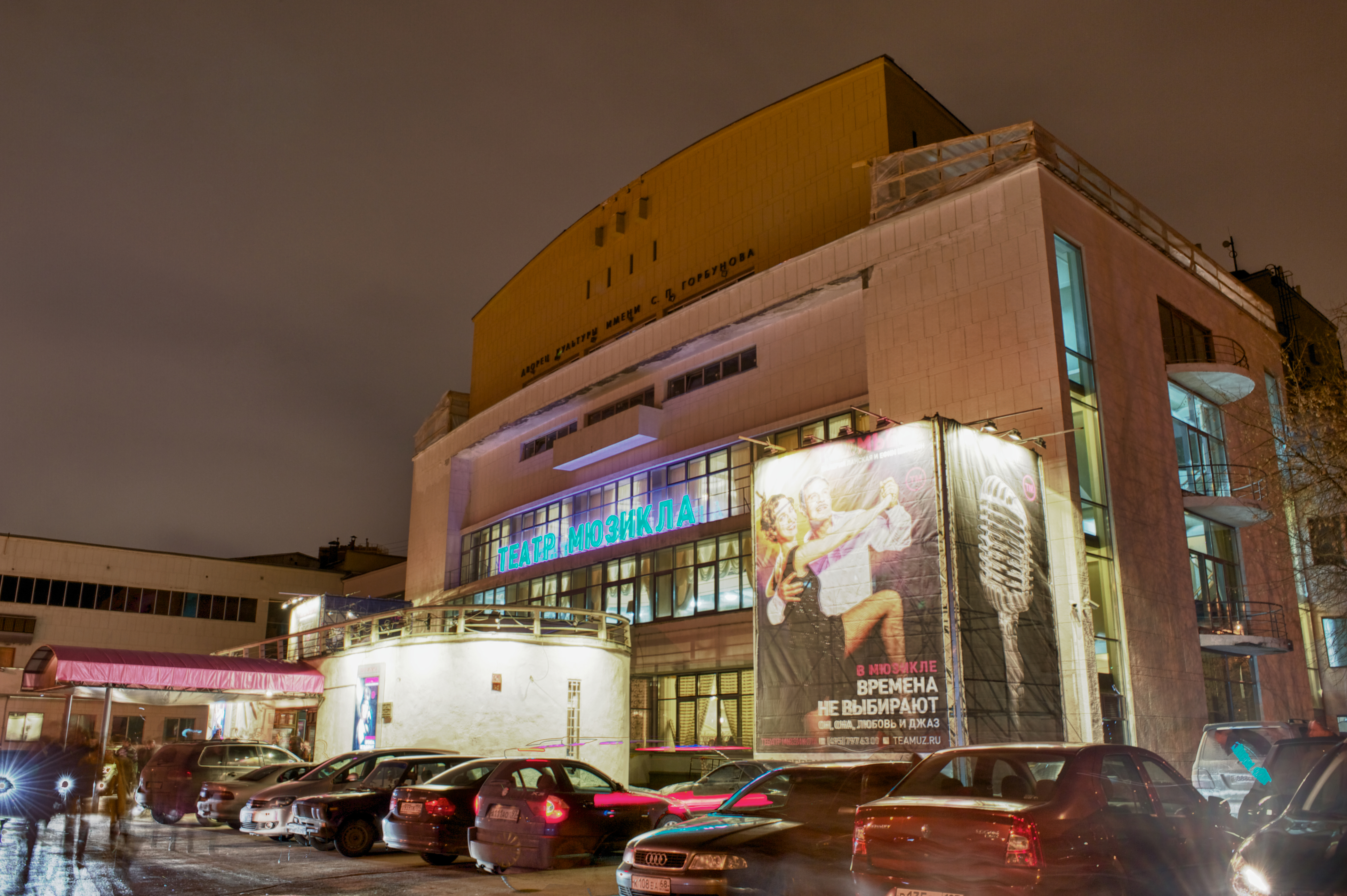 Главный вход в театр мюзикла и парковка